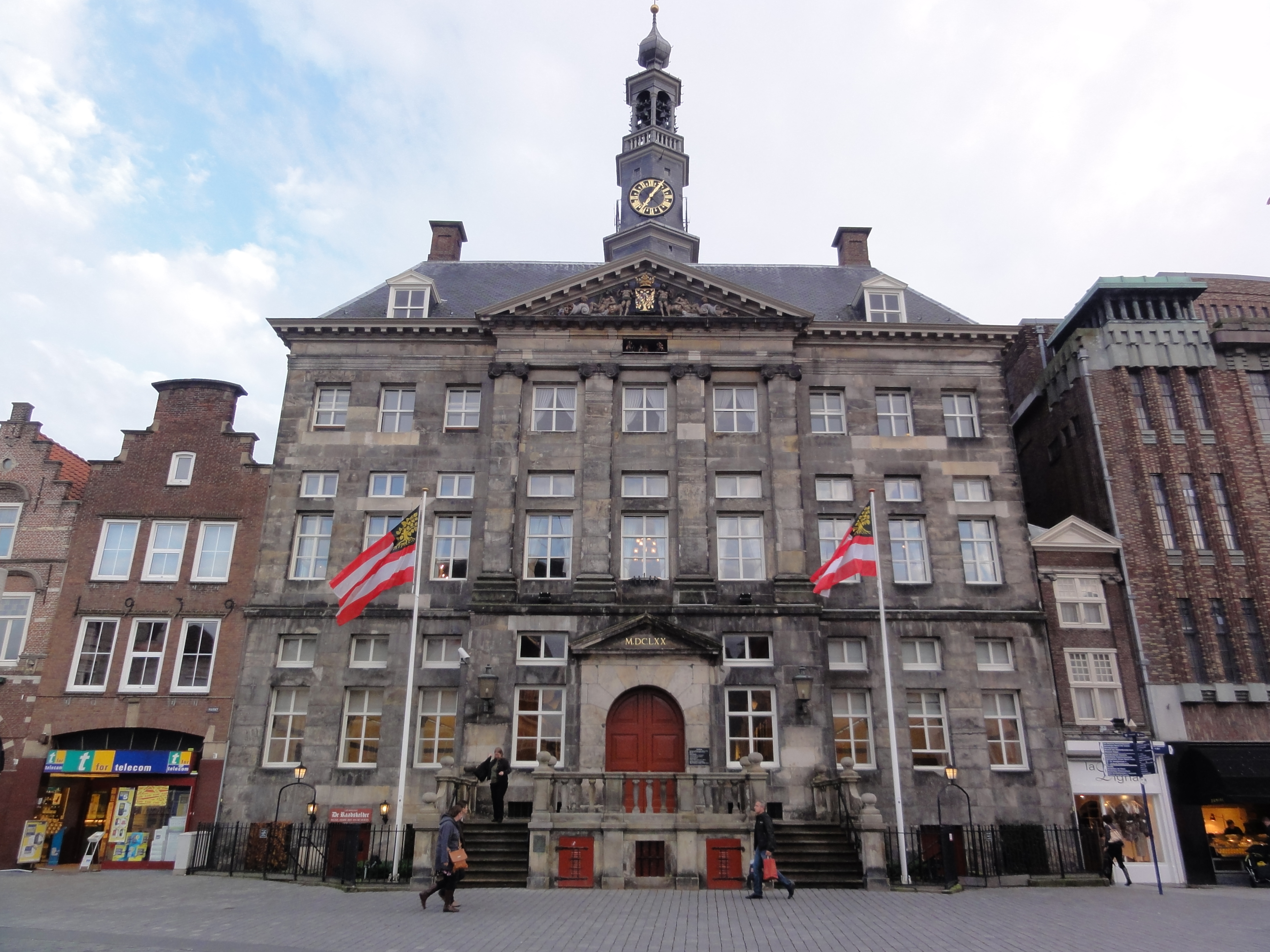 's-Hertogenbosch Rijksmonument 21719 Stadhuis, Markt 1. In de toren bevindt zich een beiaard met veertien klokken van Francois en Pieter Hemony uit 1649 en van Melchior de Haze uit 1691, verder een anonieme uurklok uit 1372, diameter 120 cm, genaamd Maria. Trommelspeelwerk van Juriaan Sprakel, 1691. In de architraaf van de gevel een ruiterspel.